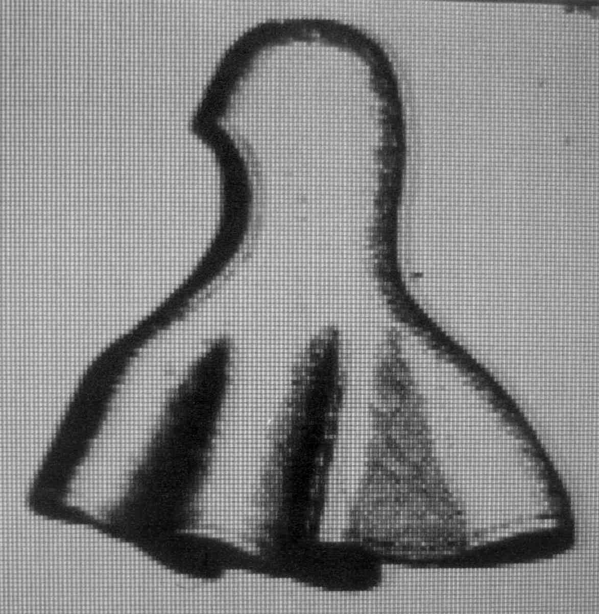 Bonnet de la Compagnie de la mère folle de Dijon.